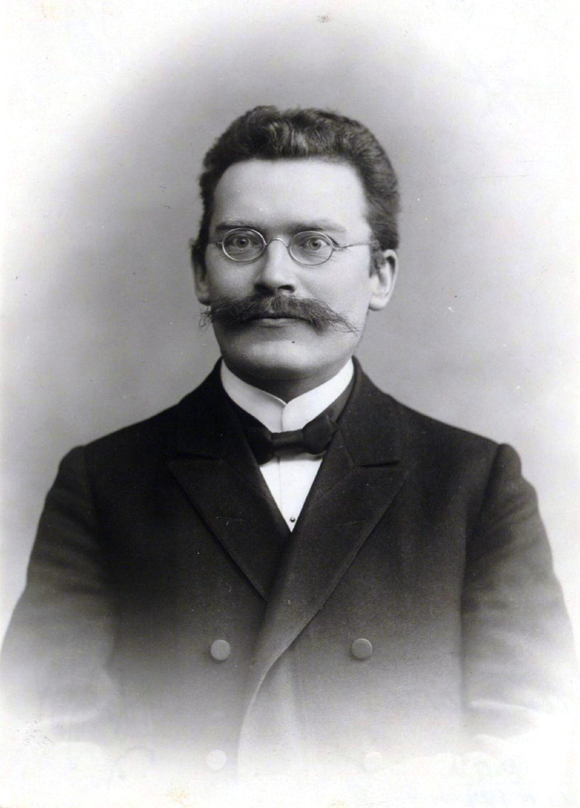 Партс, Карл Эвердович